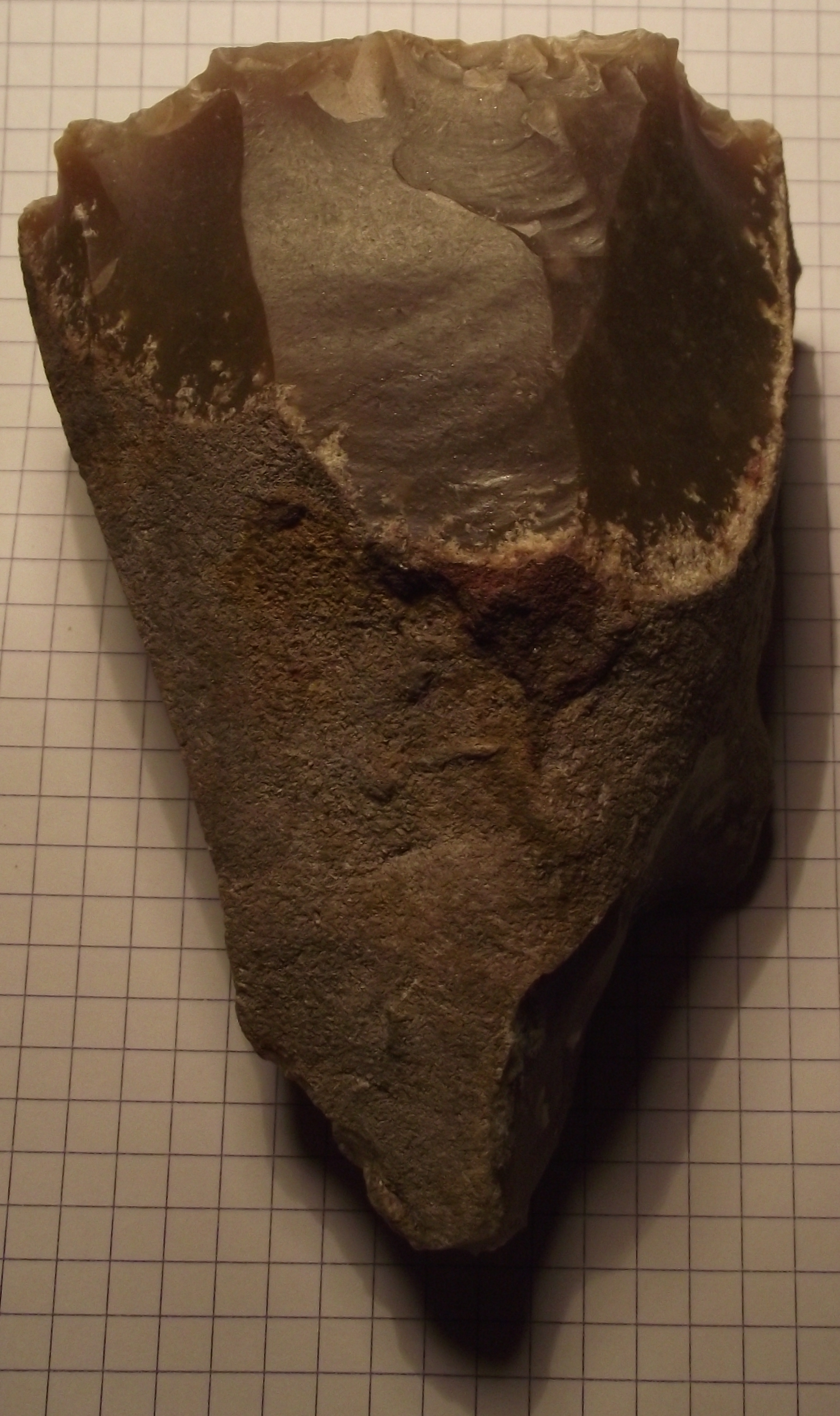 Nucleus découvert à Bèze en 2018, à proximité de la résurgence